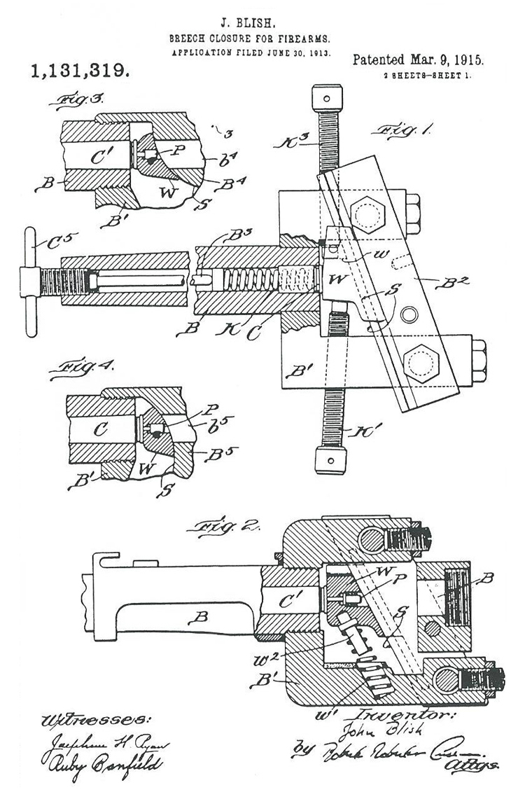 Blish-Patent, März-09-1915